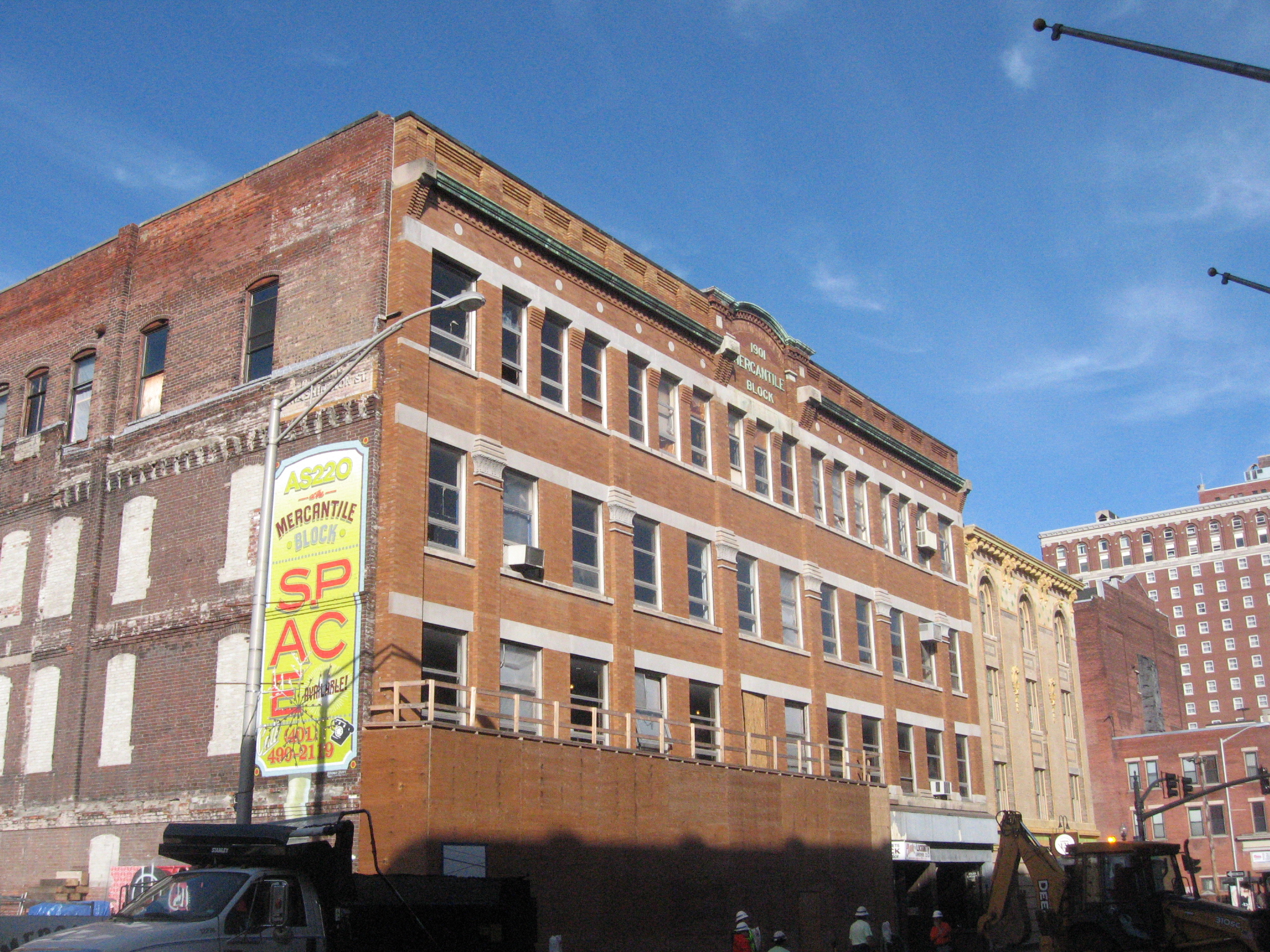 as220 expansion